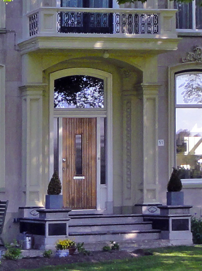 Detail van de Ebelsheerd aan de Hoofdweg 51 te Nieuw-Beerta